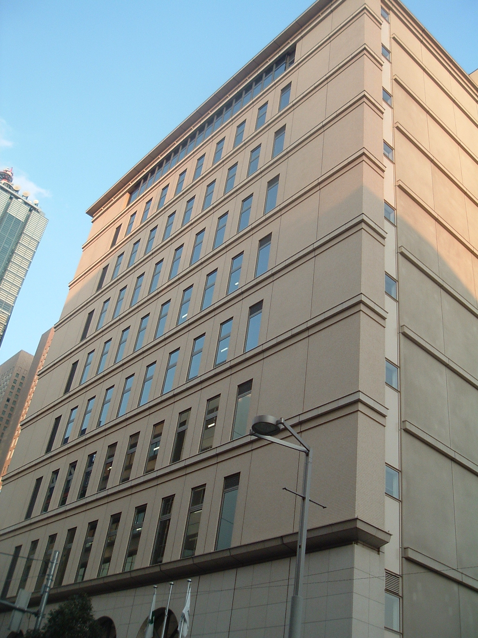 東京都港区東新橋二丁目にある東電通の本社ビル